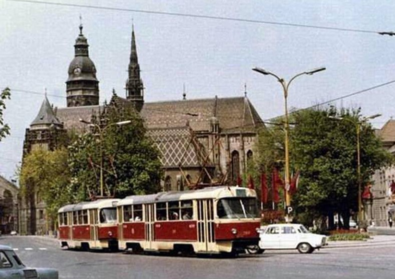 Súprava električiek T3 na Hlavnej ulici v Košiciach, 70. roky 20. storočia